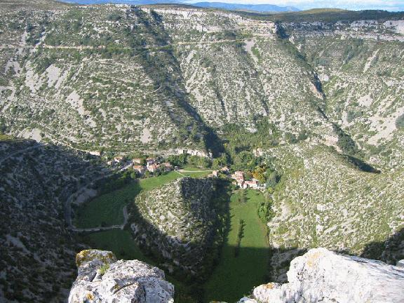 Photo du cirque de Saint-Maurice-Navacelles (Hérault France) 2004. Cevenol2